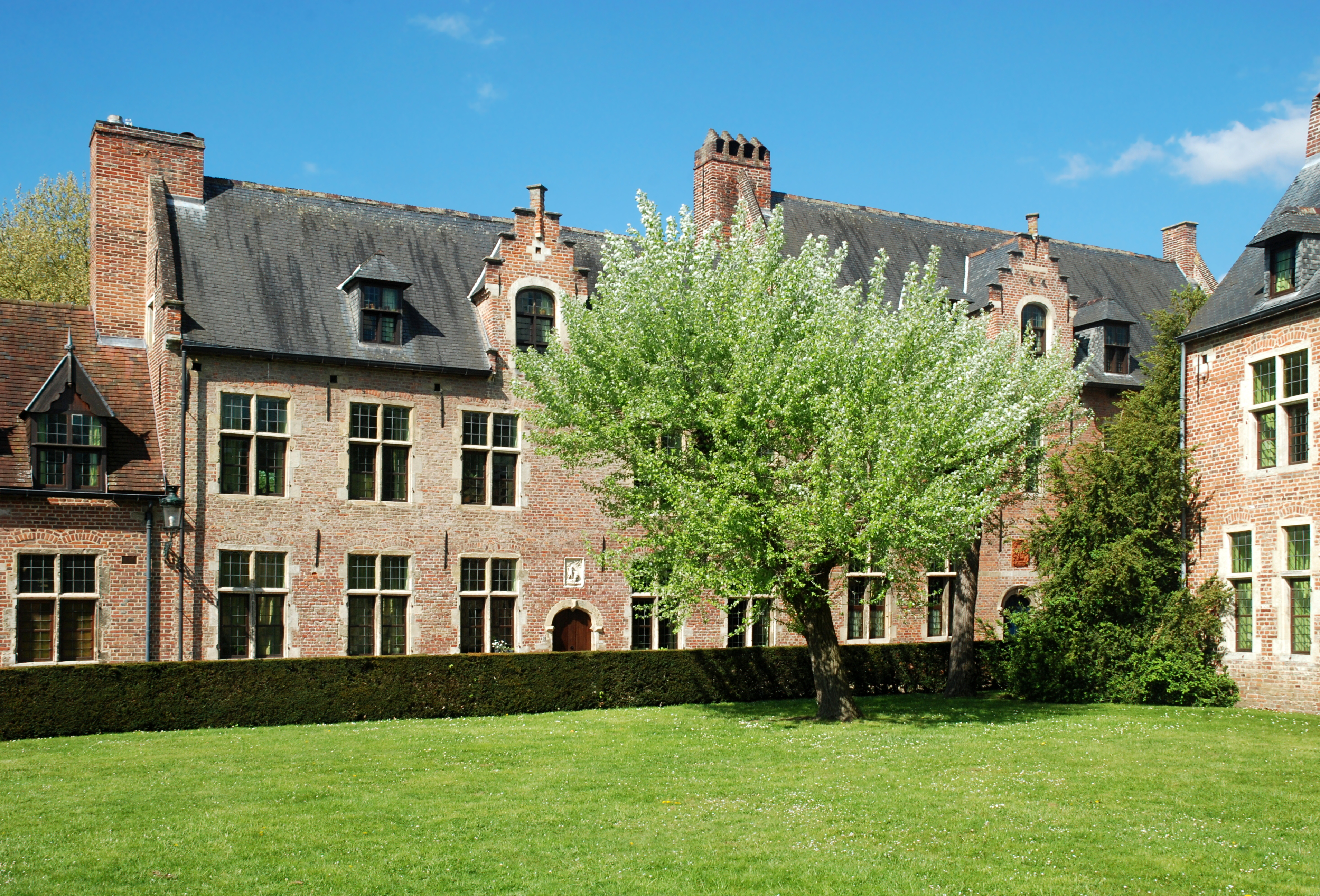 Belgique - Louvain - Grand Béguinage - Quartier espagnol n° 26-27 - couvent de la Vierge de la Présentation